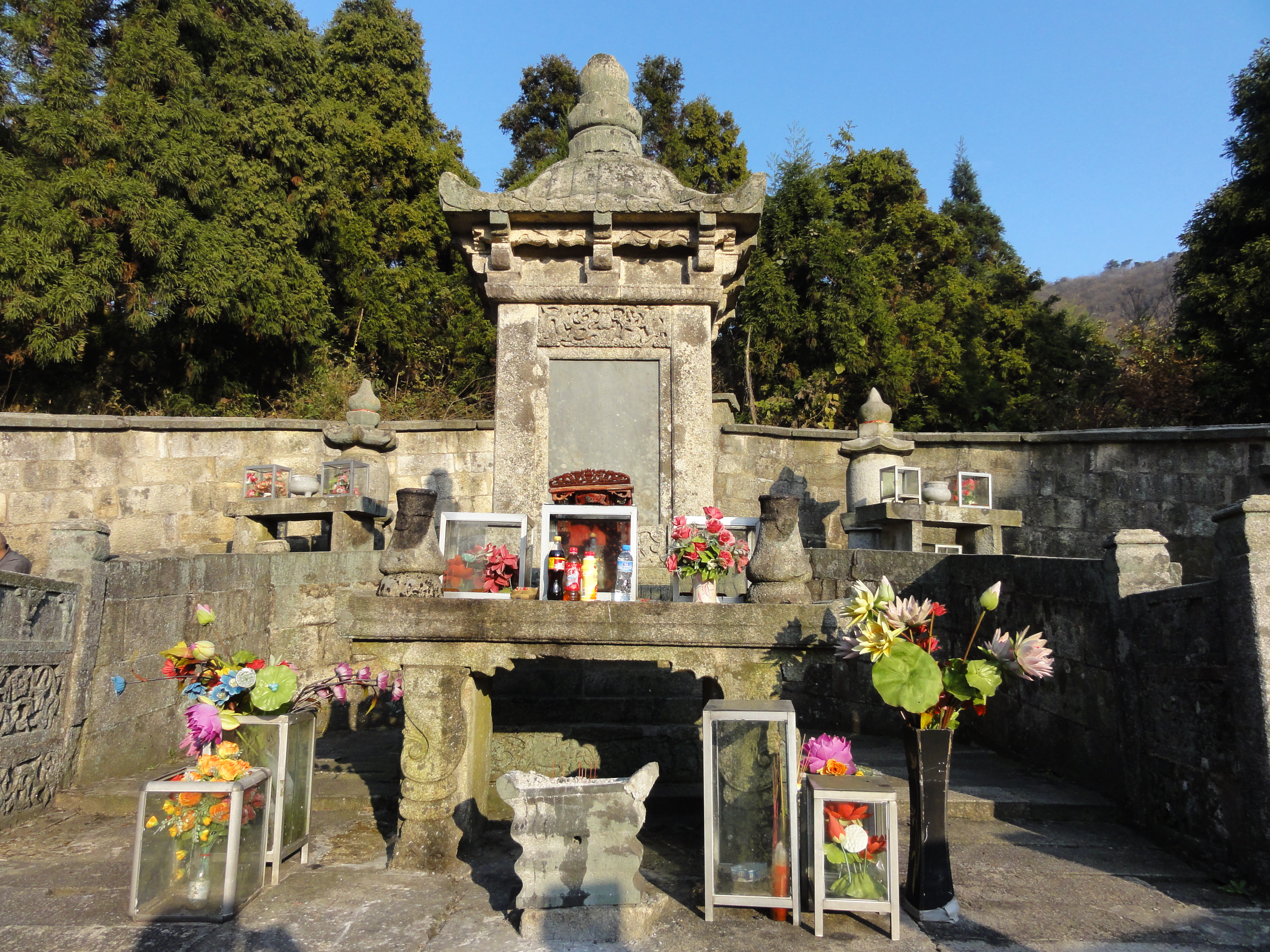 明代高僧顓愚觀衡和尚圓寂後建塔於雲居山真如禪寺